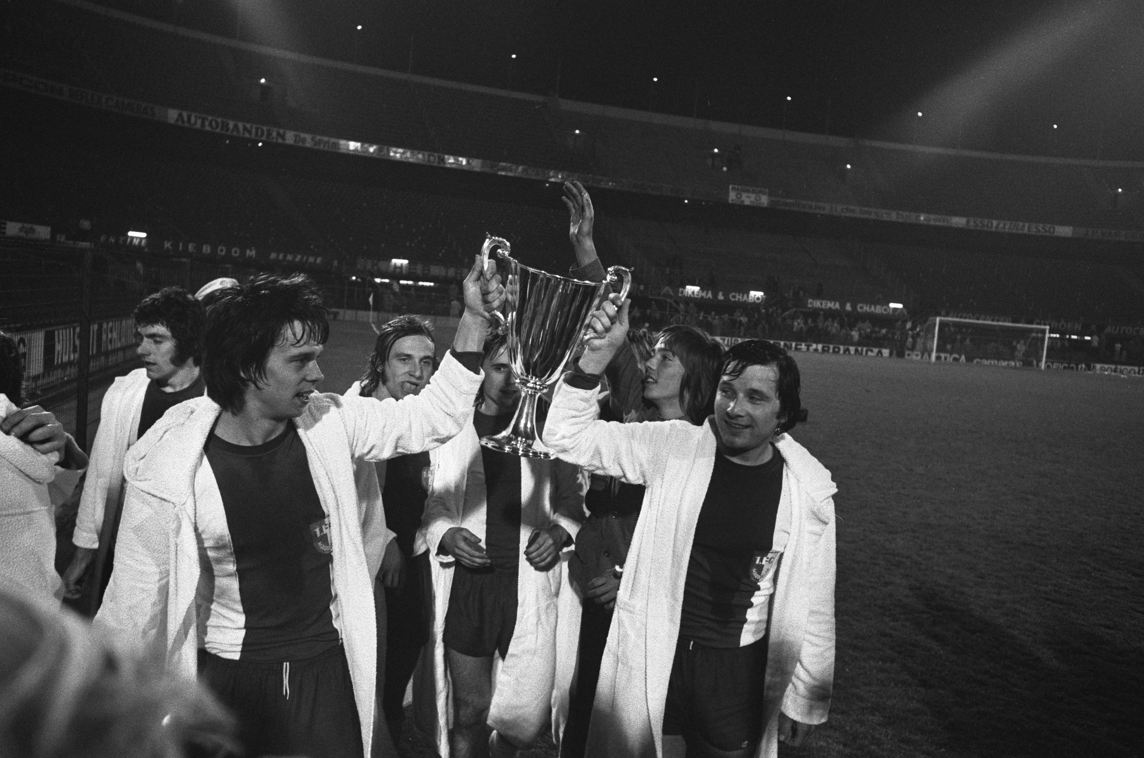 Collectie / Archief : Fotocollectie Anefo Reportage / Serie : [ onbekend ] Beschrijving : AC Milan tegen FC Magdeburg 0-2, finale Europacup II spelers met beker Datum : 8 mei 1974 Trefwoorden : SPELERS, bekers, sport, voetbal Persoonsnaam : Fc Magdeburg Instellingsnaam : AC Milaan Fotograaf : Verhoeff, Bert / Anefo Auteursrechthebbende : Nationaal Archief Materiaalsoort : Negatief (zwart/wit) Nummer archiefinventaris : bekijk toegang 2.24.01.05 Bestanddeelnummer : 927-1804